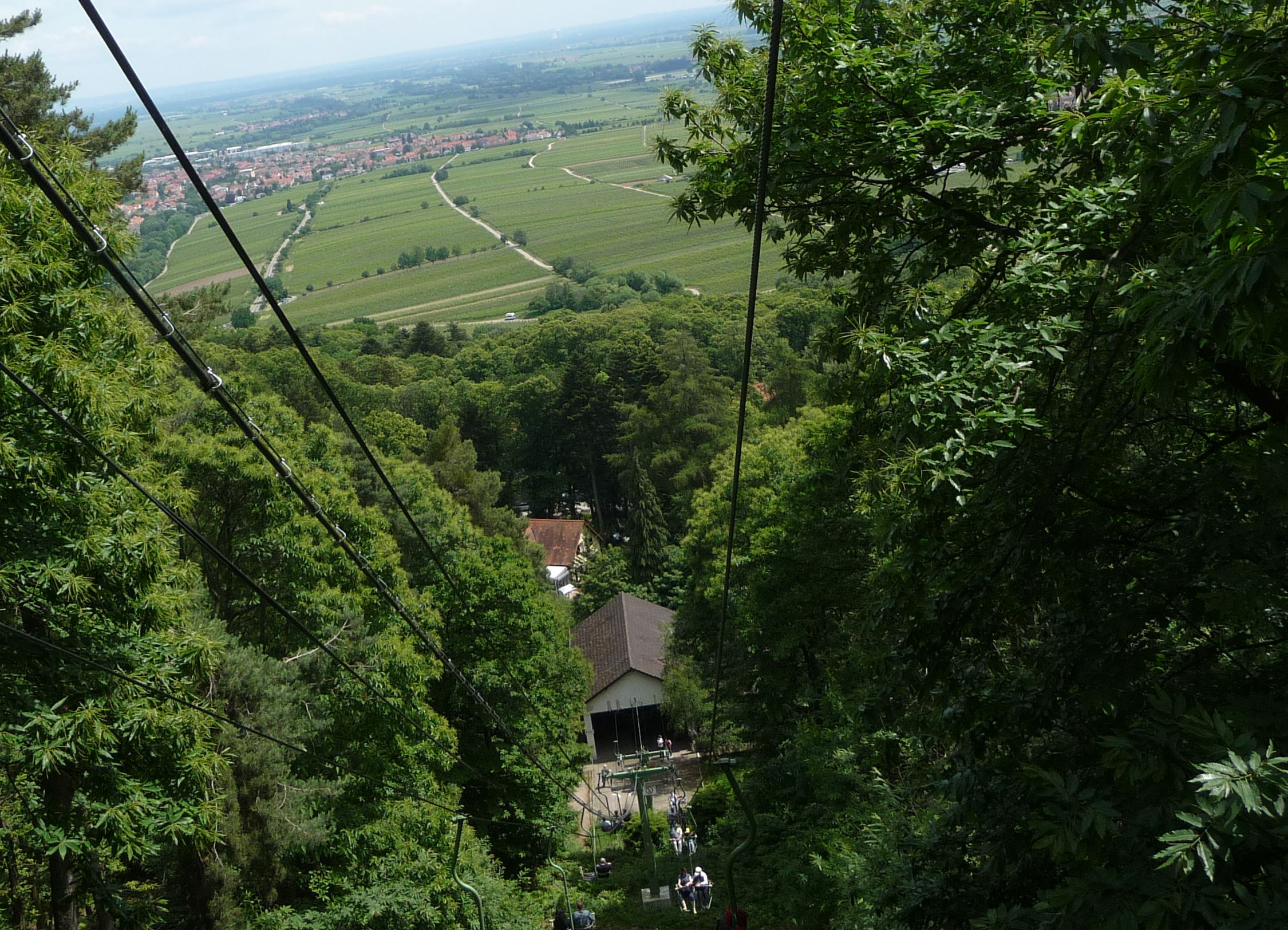 Rietburgbahn im Pfälzerwald